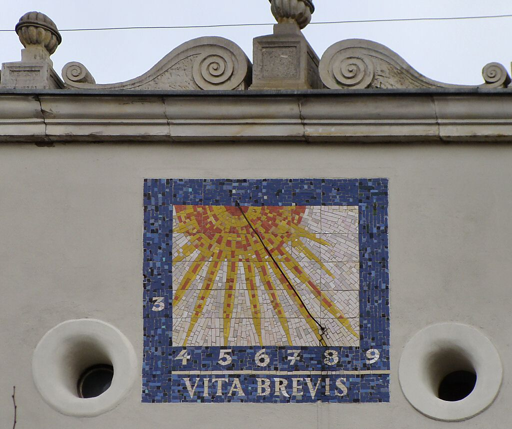 Zegar słoneczny - Zamek Książąt Pomorskich w Szczecinie